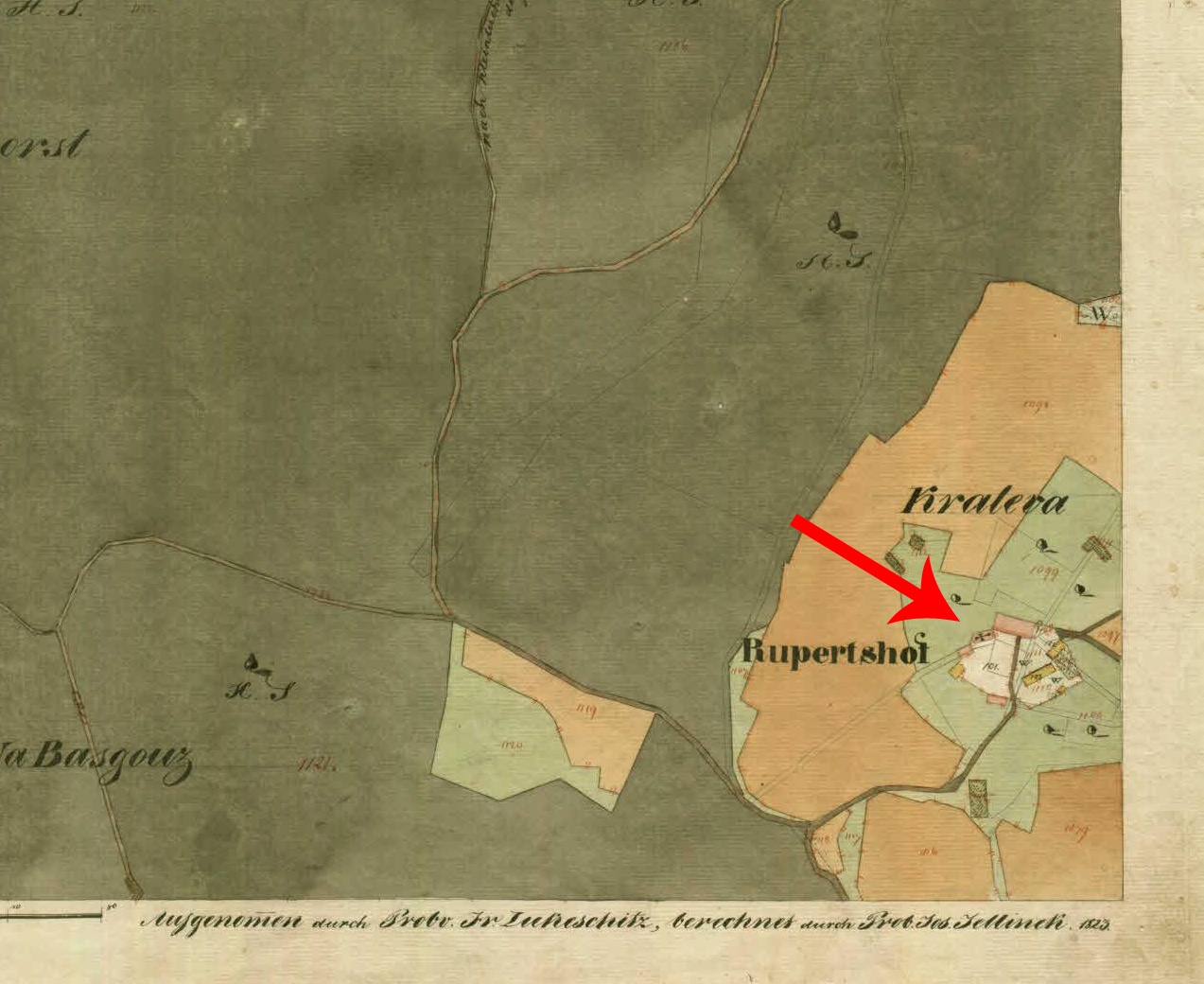 Franciscejski kataster za Kranjsko, 1823-1869